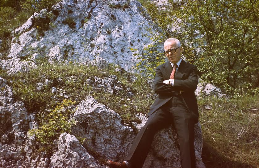 Zbigniew Żekanowski (1927-2009) - polski matematyk, prof. dr. hab. Politechniki Warszawskiej